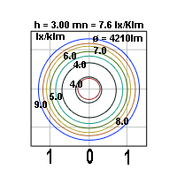 Grafico che mostra il flusso luminoso di una lampada GUN BEDSIDE dell'azienda italiana FLOS